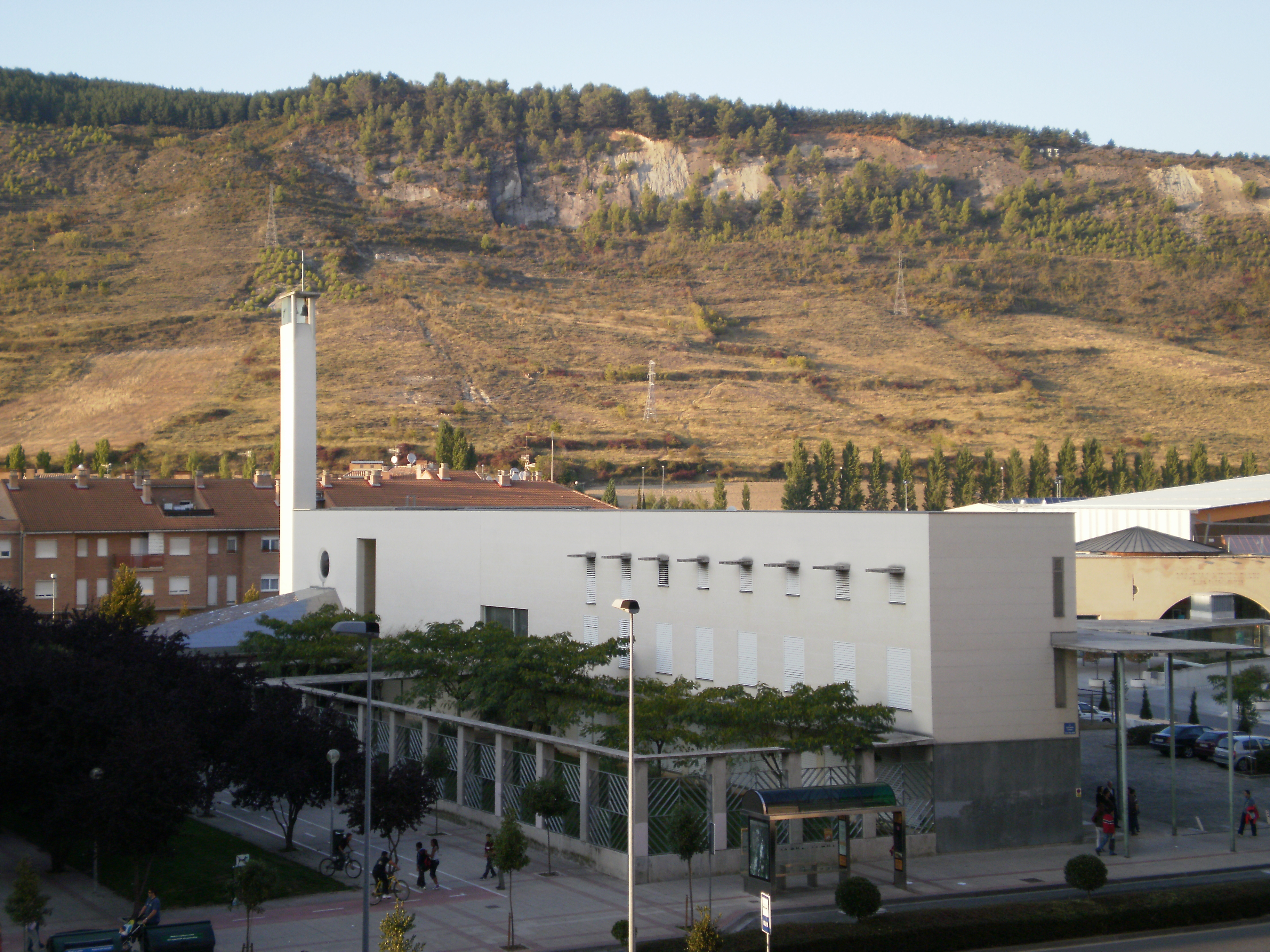 Iglesia de San Cosme y San Damián de la localidad de Ansoáin (Navarra - España) del casco nuevo.